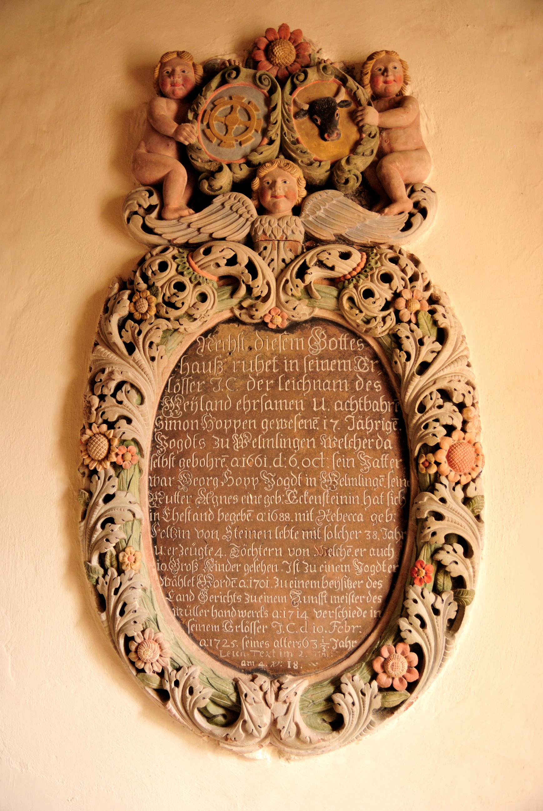 Peterskirche Blansingen: Grabplatte im Turmeingang (zur rechten Seite) von Simon Hopp, Vogt zu Welmlingen, Beisitzer des Landgerichts und Zunftmeister des Müllerhandwerks († 10. Februar 1725)